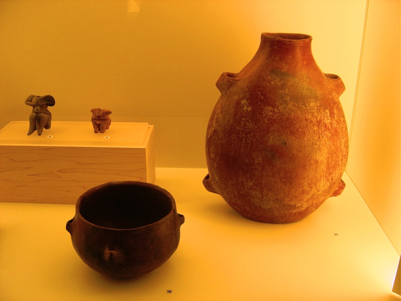 Aardewerk 7e millennium v.C. Höyücek (Sagalossos opgraving)